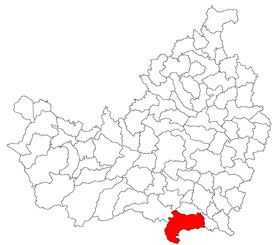 Comuna Moldovenești, judeţul Cluj